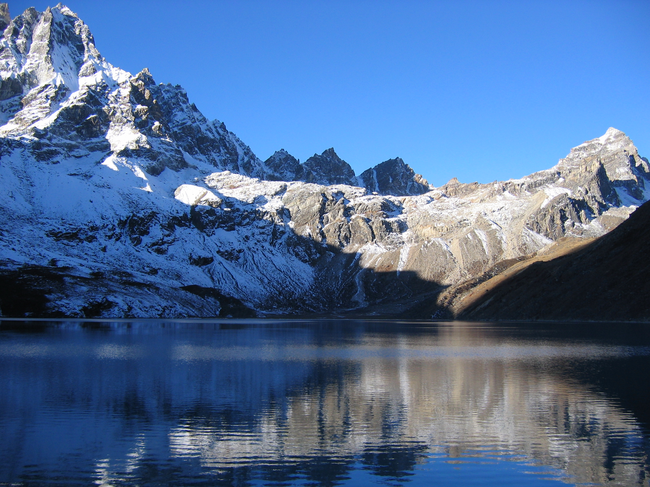 Gokyo Lake. 4750 m. Nepal